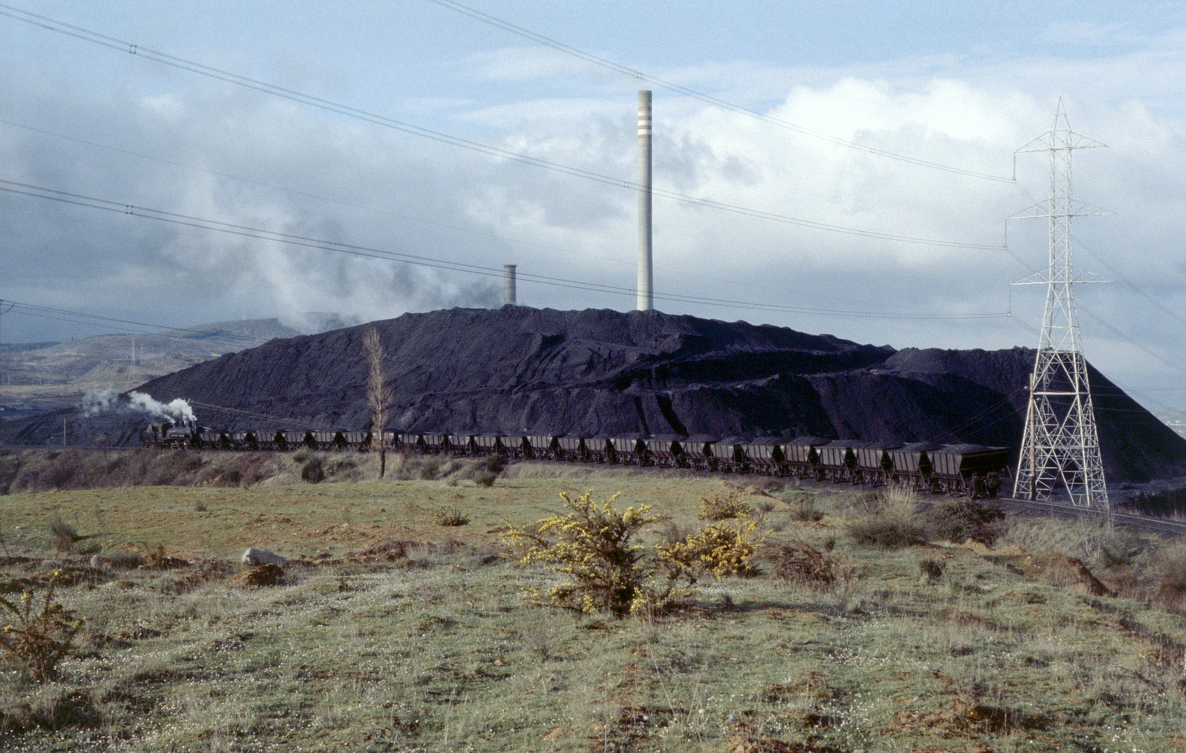 La 132 T Engerth N°31 manœuvre sur l'embranchement de la centrale électrique de Cubillos del Sil, au mois d'avril 1984.